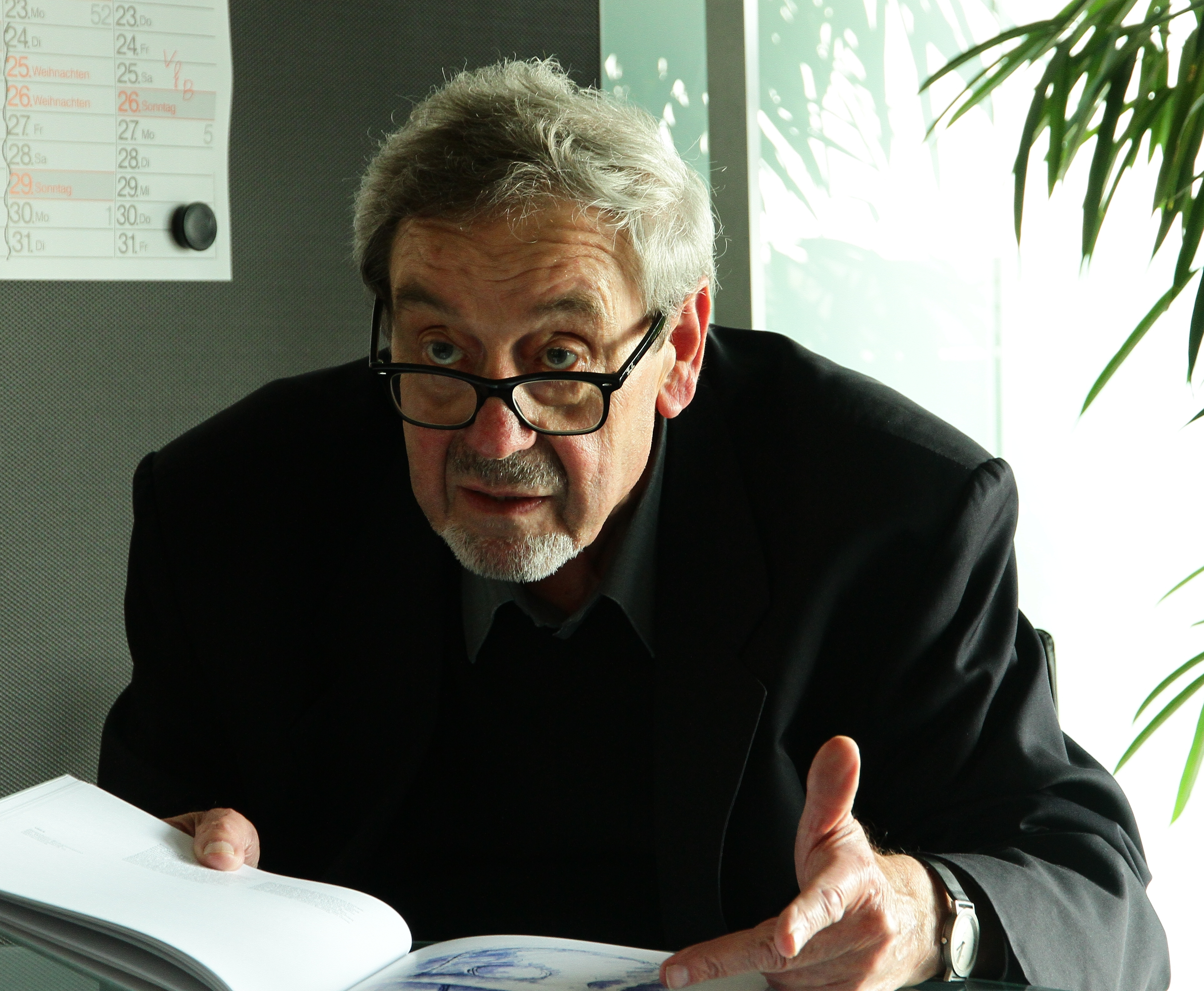 Porträtfoto von Arno Votteler, 2013.